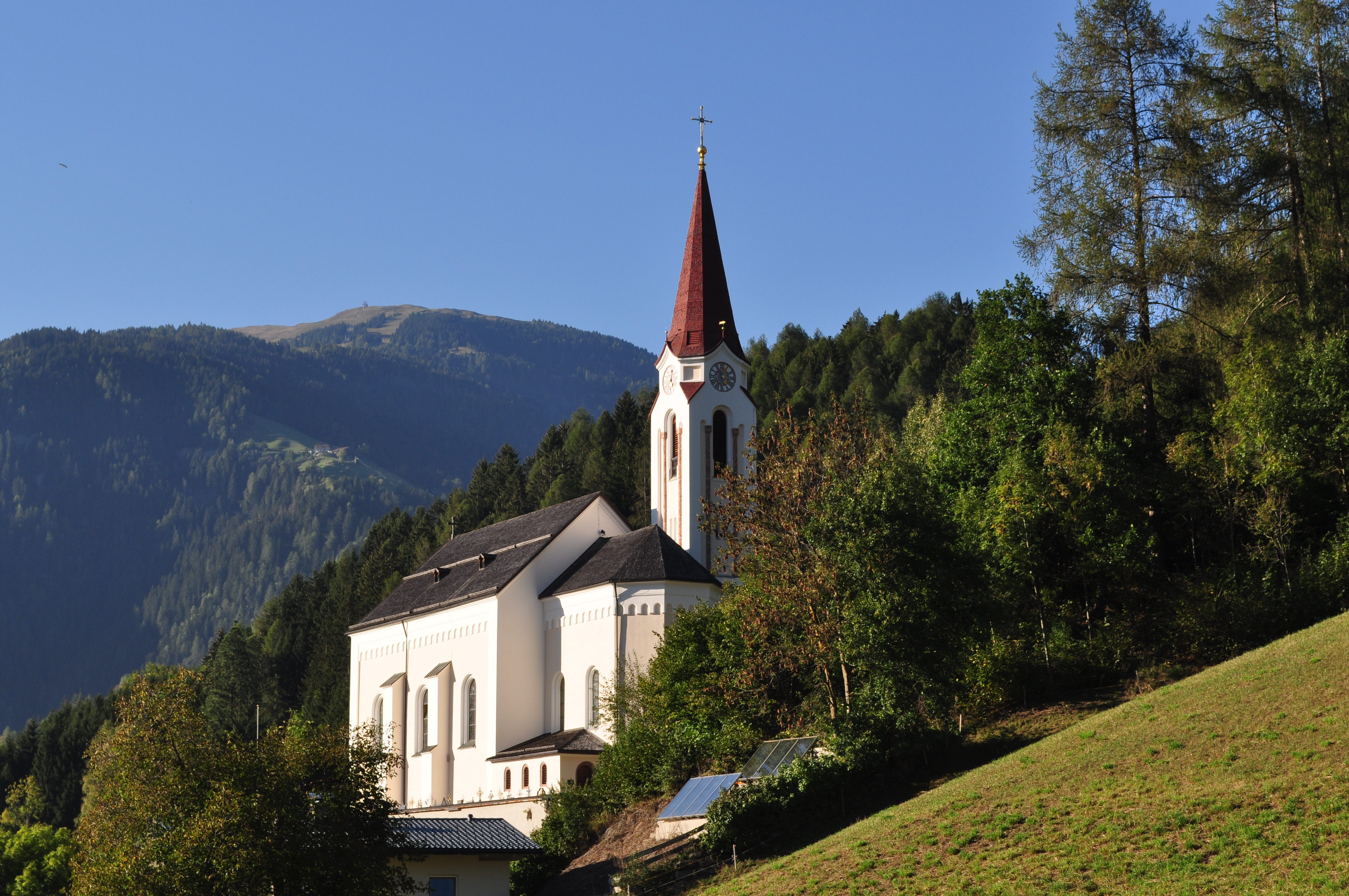 Kath. Pfarrkirche St. Martin